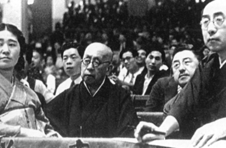 東京大相撲大阪場所を観戦する家達。(中央の老人)